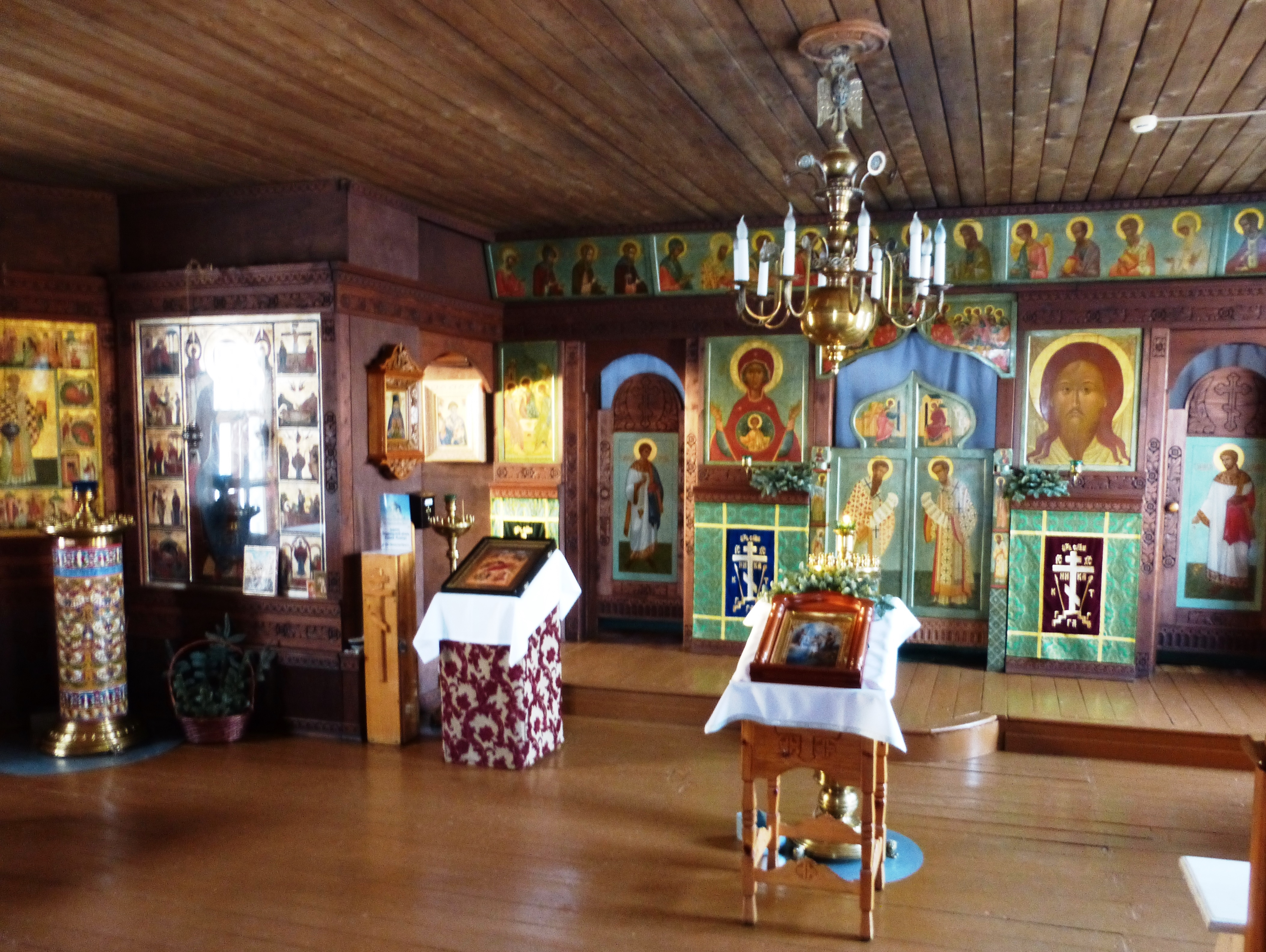 Внутреннее убранство Храма во имя Святого и Животворящего Духа (Петрозаводск)